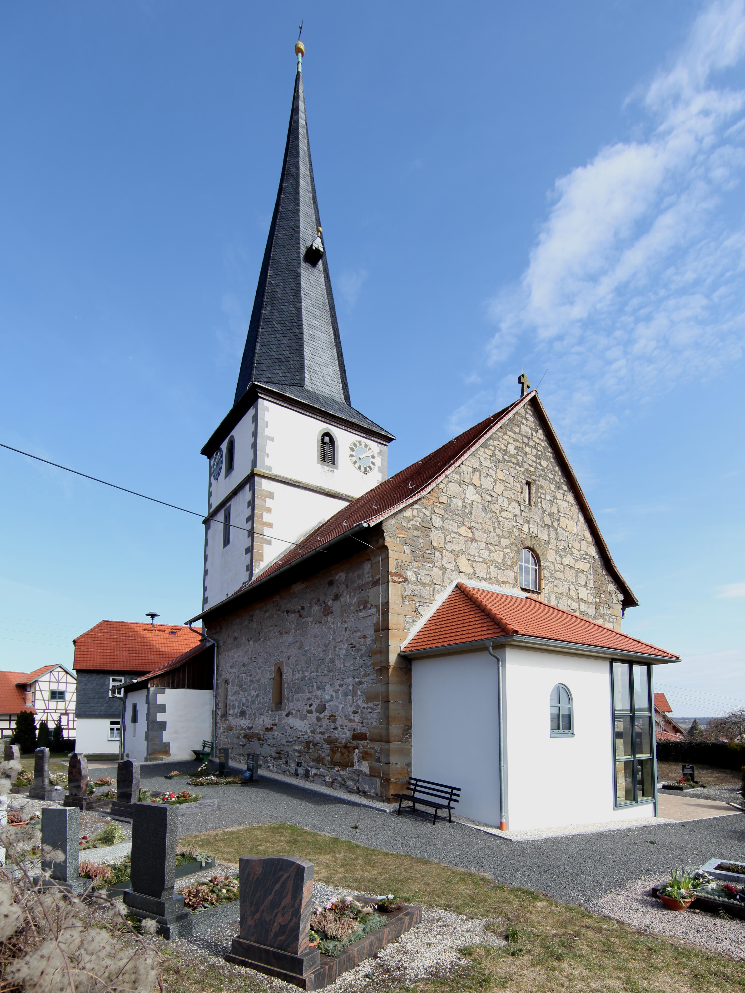 Evangelisch-Lutherische Kirche St. Nikolaus in Gleichamberg, OT von Römhild, Landkreis Hildburghausen